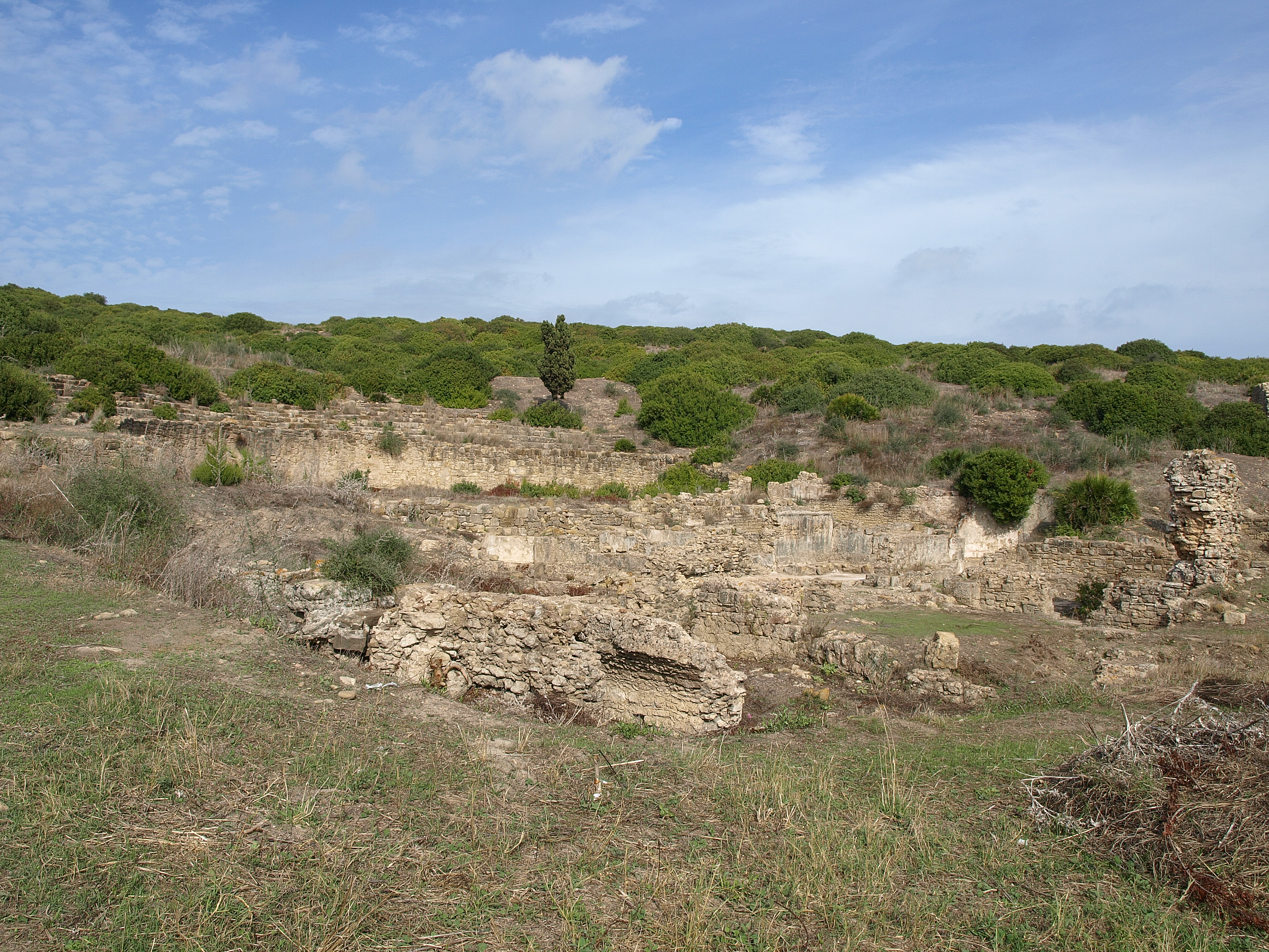 Lixus Site in Morocco 2011